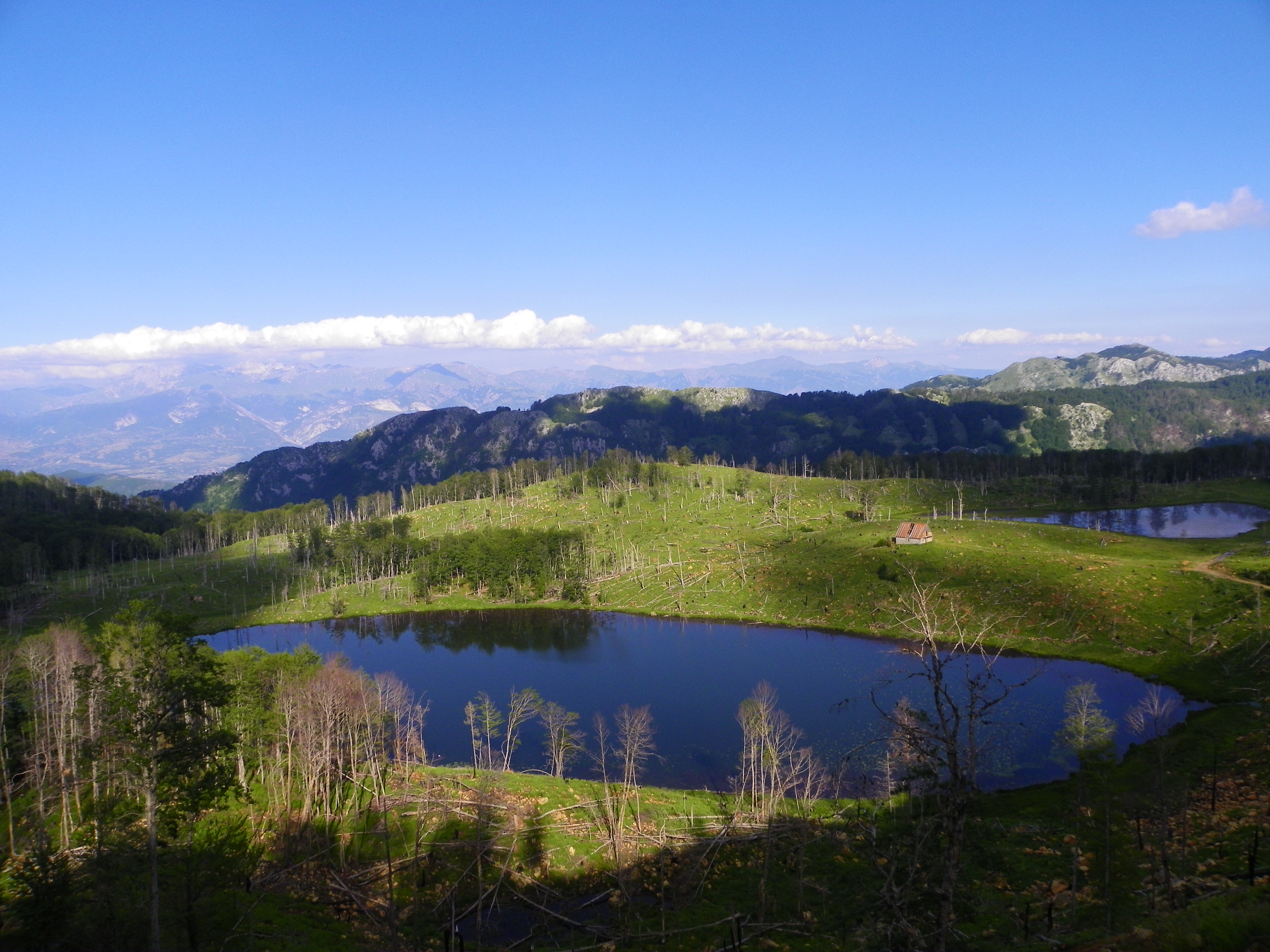 Lura, Diber